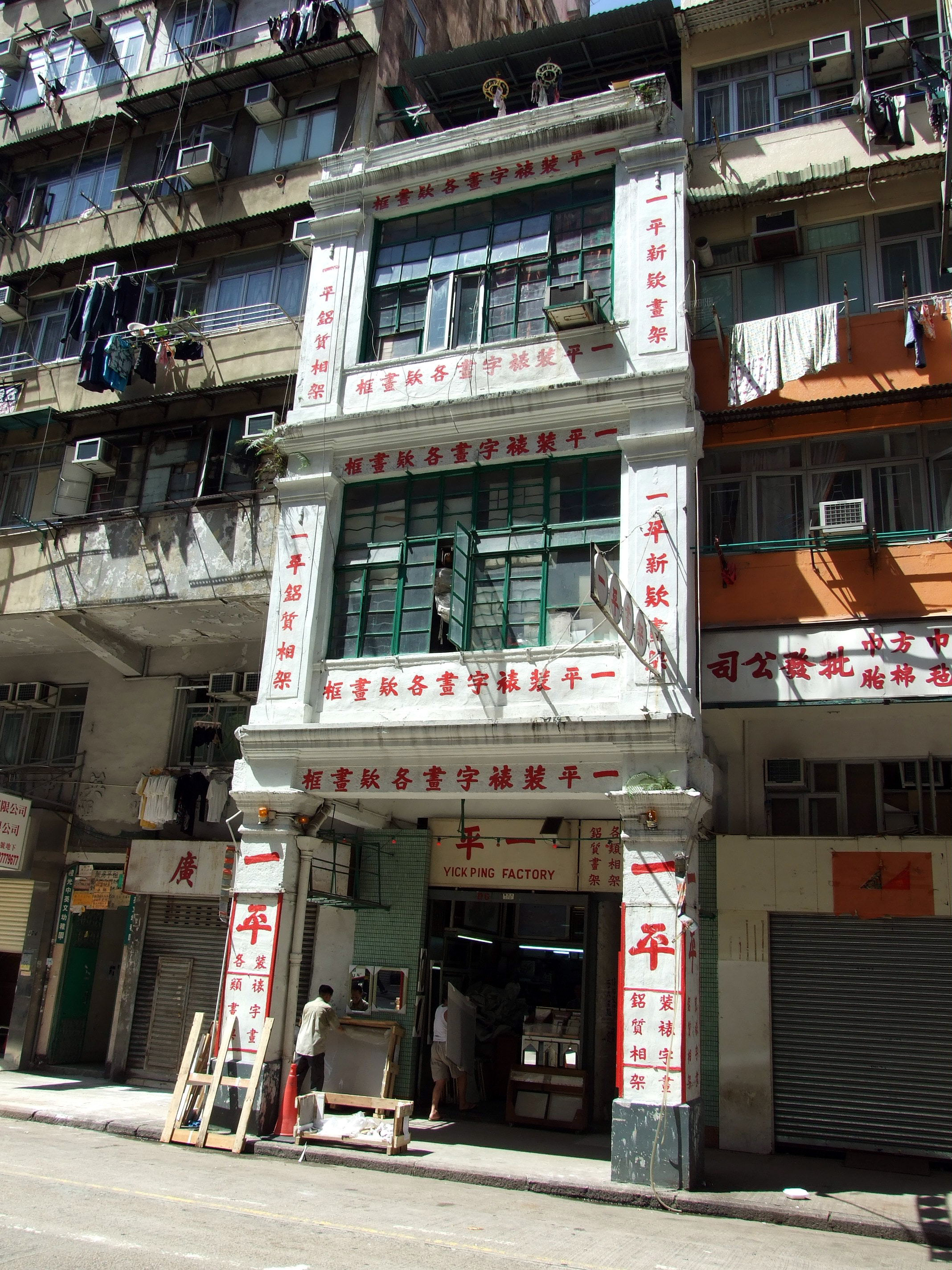 中文（香港）: 醫局街170號